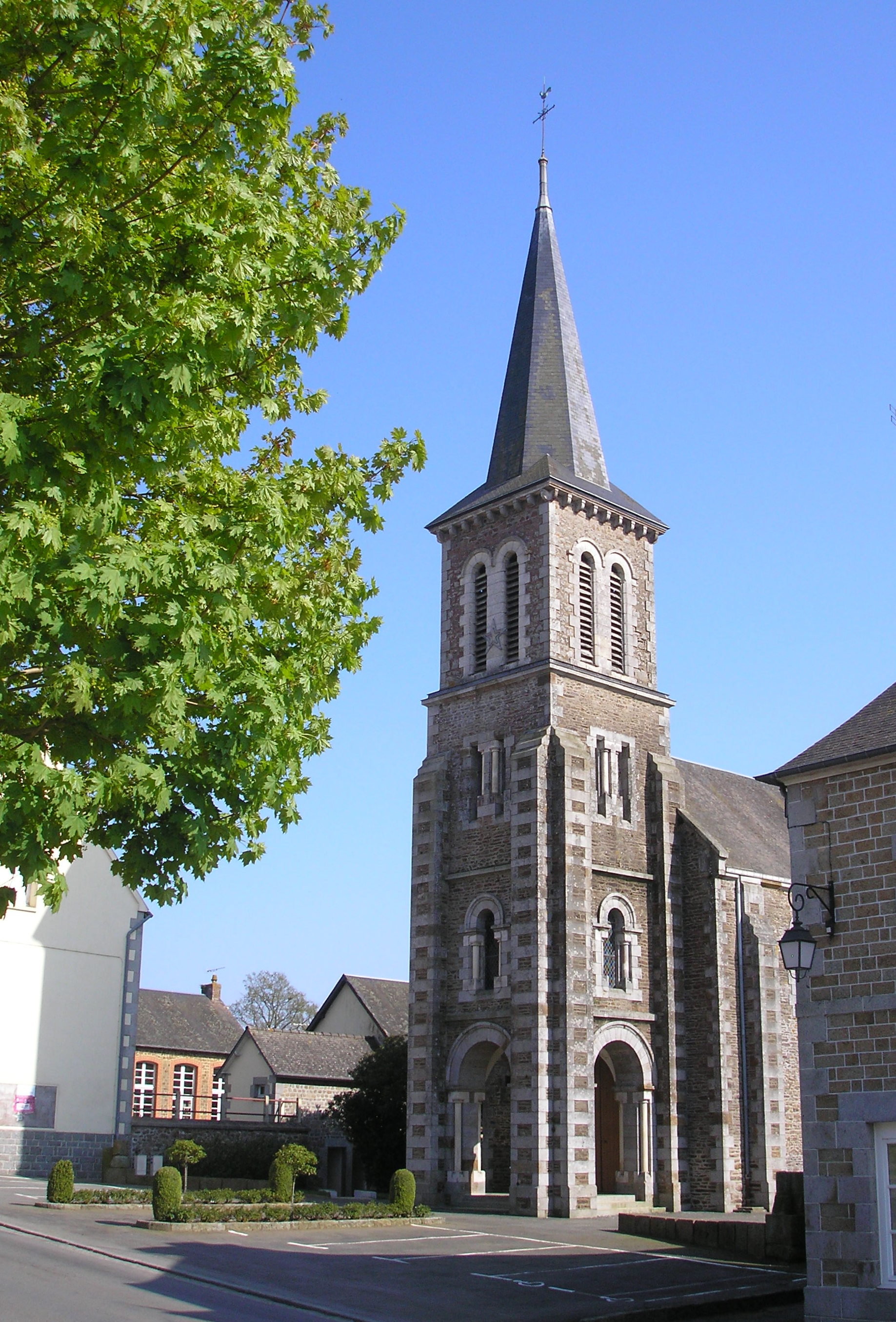 La Dorée (Pays de la Loire, France). L'église.